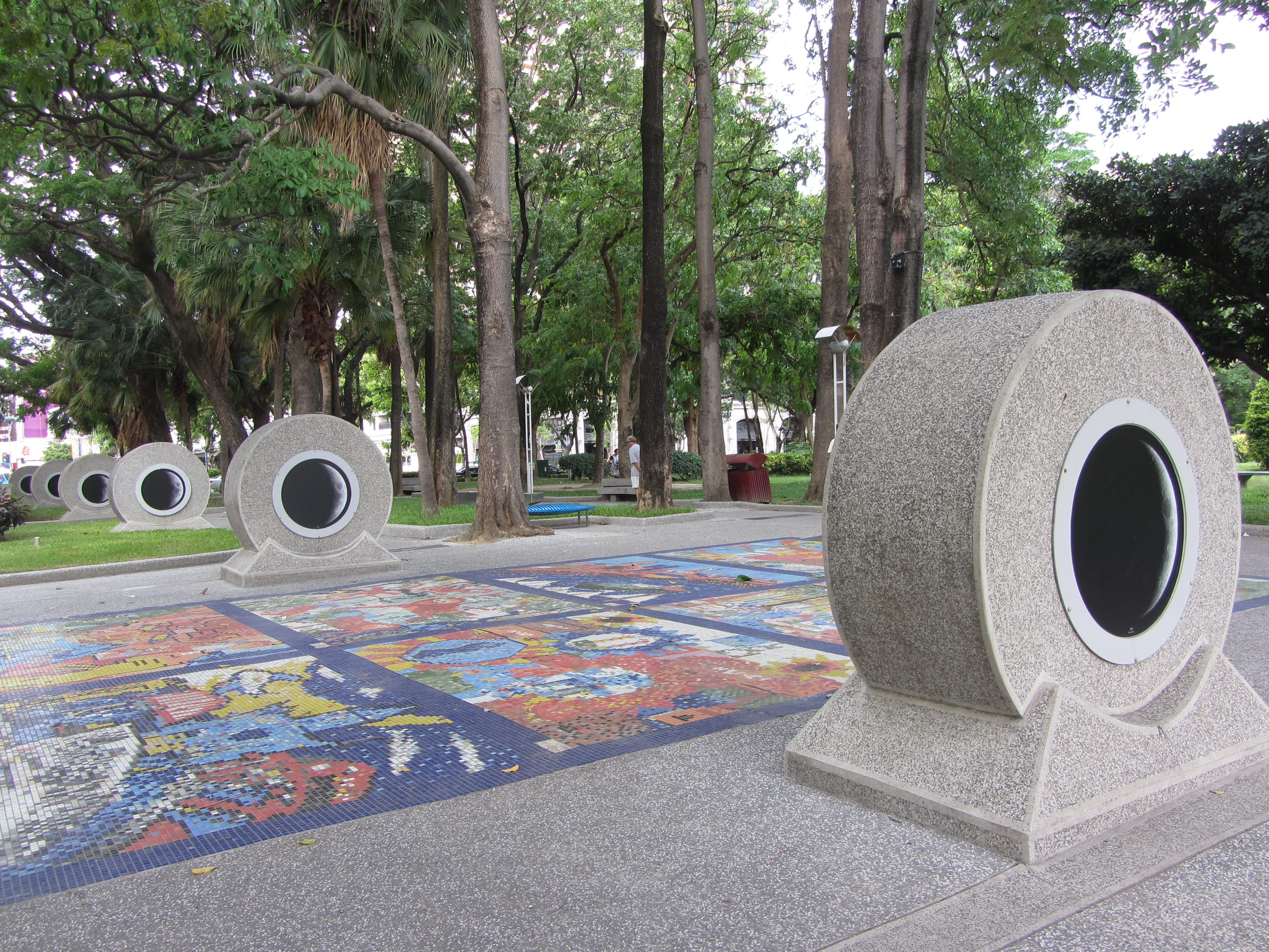 高雄市文化中心石鼓